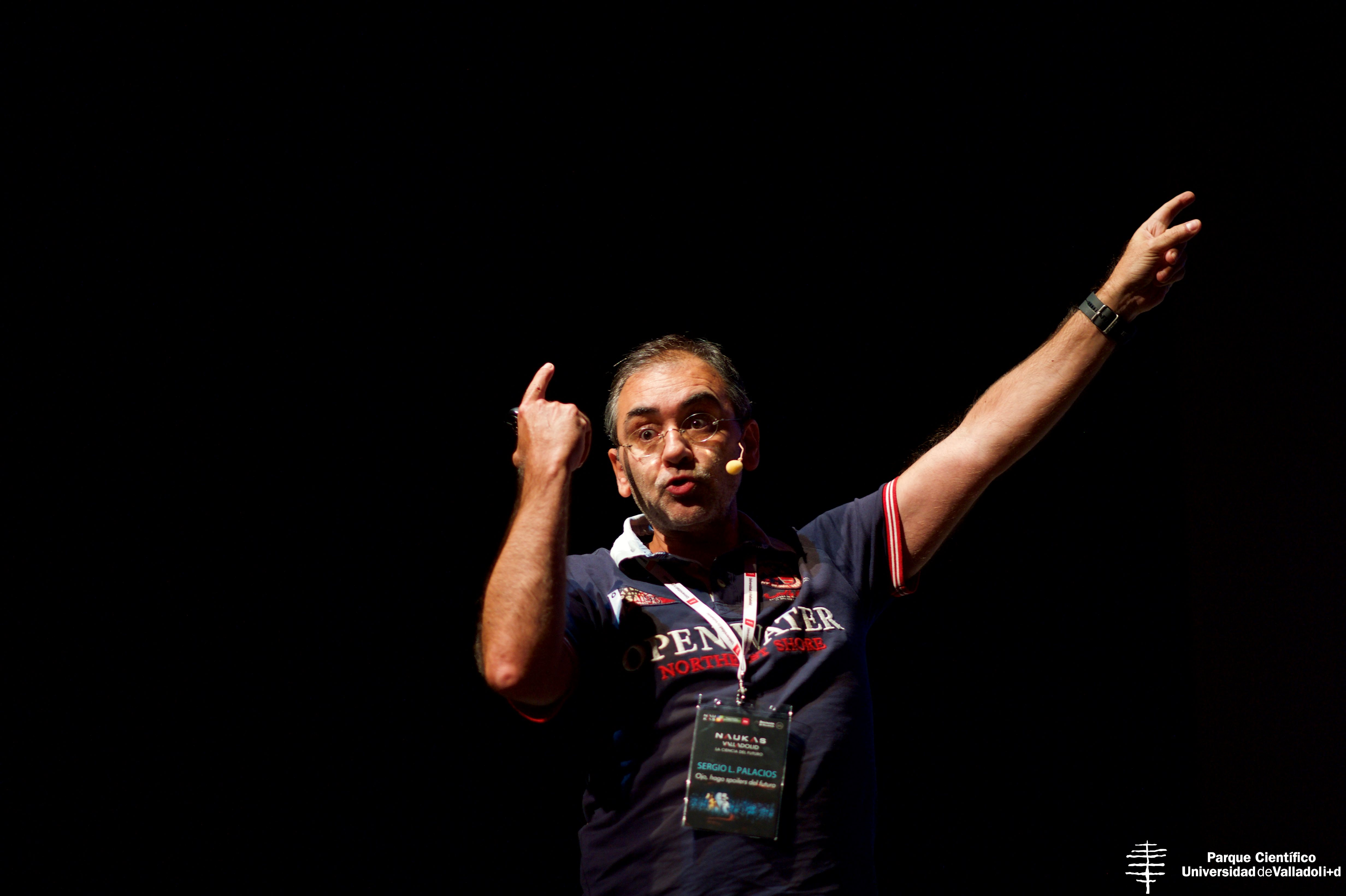 Sergio Palacios en el evento Naukas Valladolid, la ciencia del futuro, edición 2018